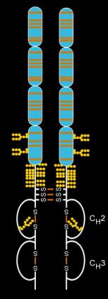 Etanercept (Enbrel) structure